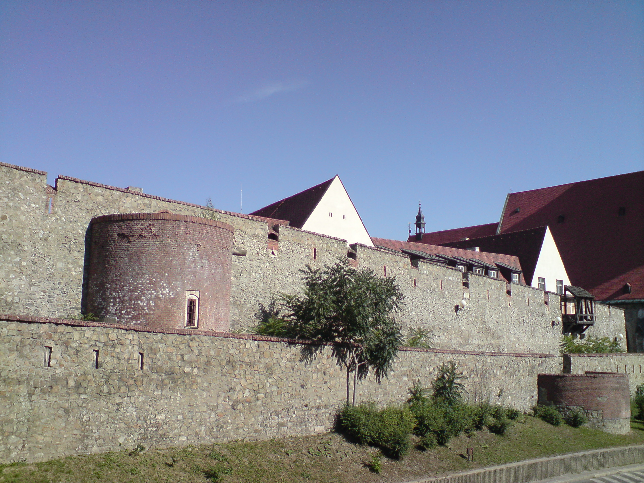 Bratislavské hradby